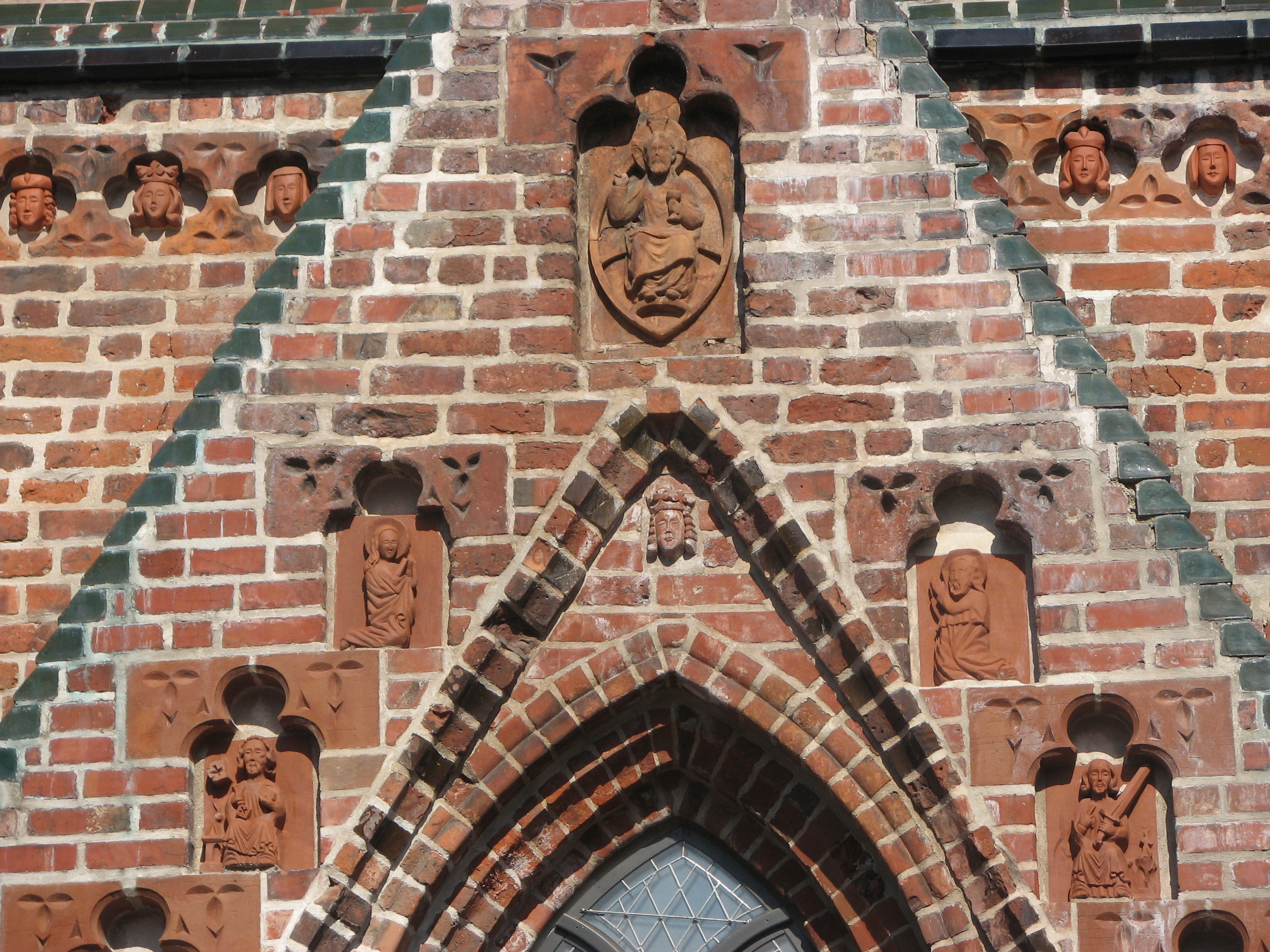 Tartu Jaani Church, Tartu, Estonia